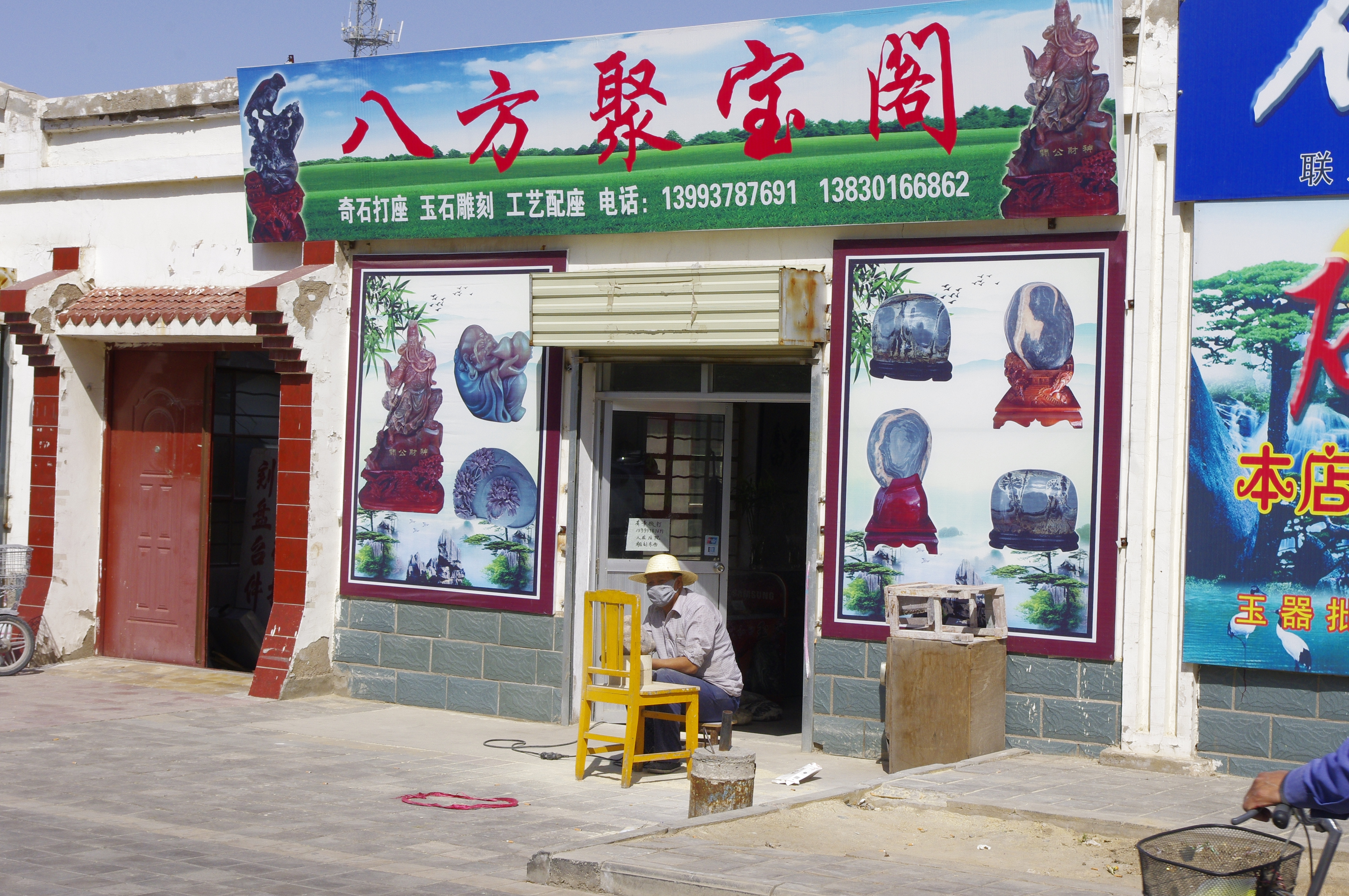 The making of this document was supported by Wikimedia Polska. To zdjęcie zostało wykonane podczas Wikiwyprawy 2015. Wszystkie zdjęcia z wyprawy możesz zobaczyć w kategorii: Wikiwyprawa 2015. English | polski | +/− To zdjęcie zostało załadowane dzięki współpracy z firmą Hyperbook. polski | +/− To zdjęcie zostało załadowane dzięki współpracy z firmą: Kopex Group. English | polski | +/−